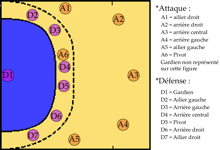 Dispositif de défense couramment utilisé au handball